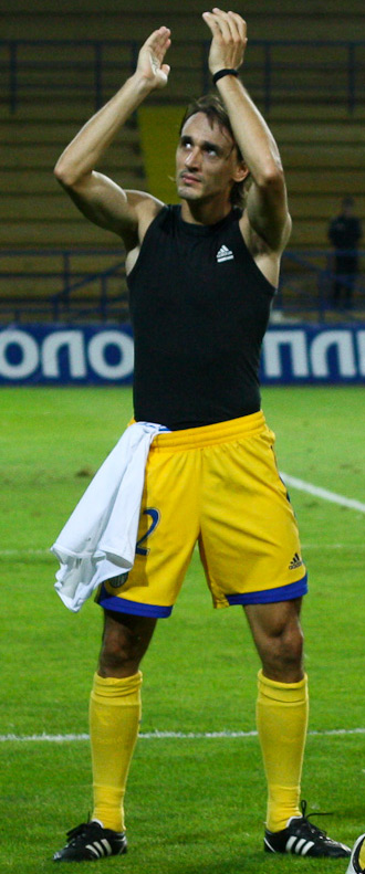 Милан Обрадович